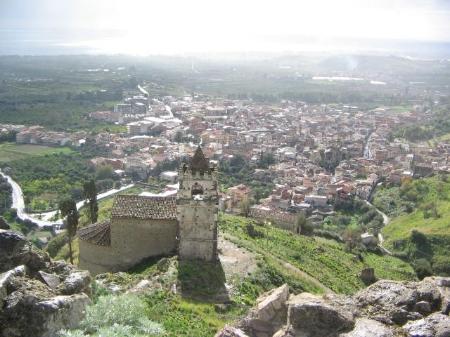 Veduta di Calatabiano, immagine realizzata dal castello.